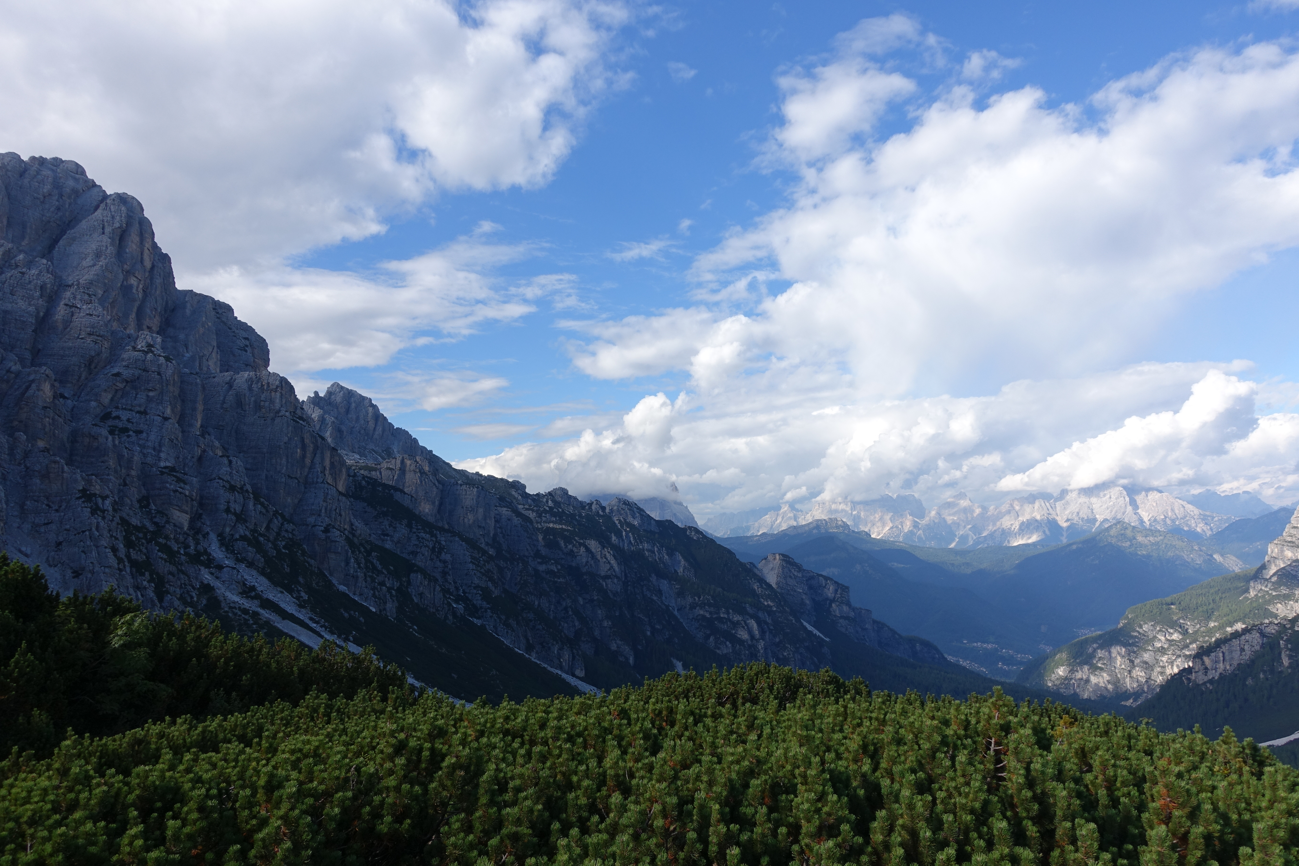 32012 Forno di Zoldo, Province of Belluno, Italy